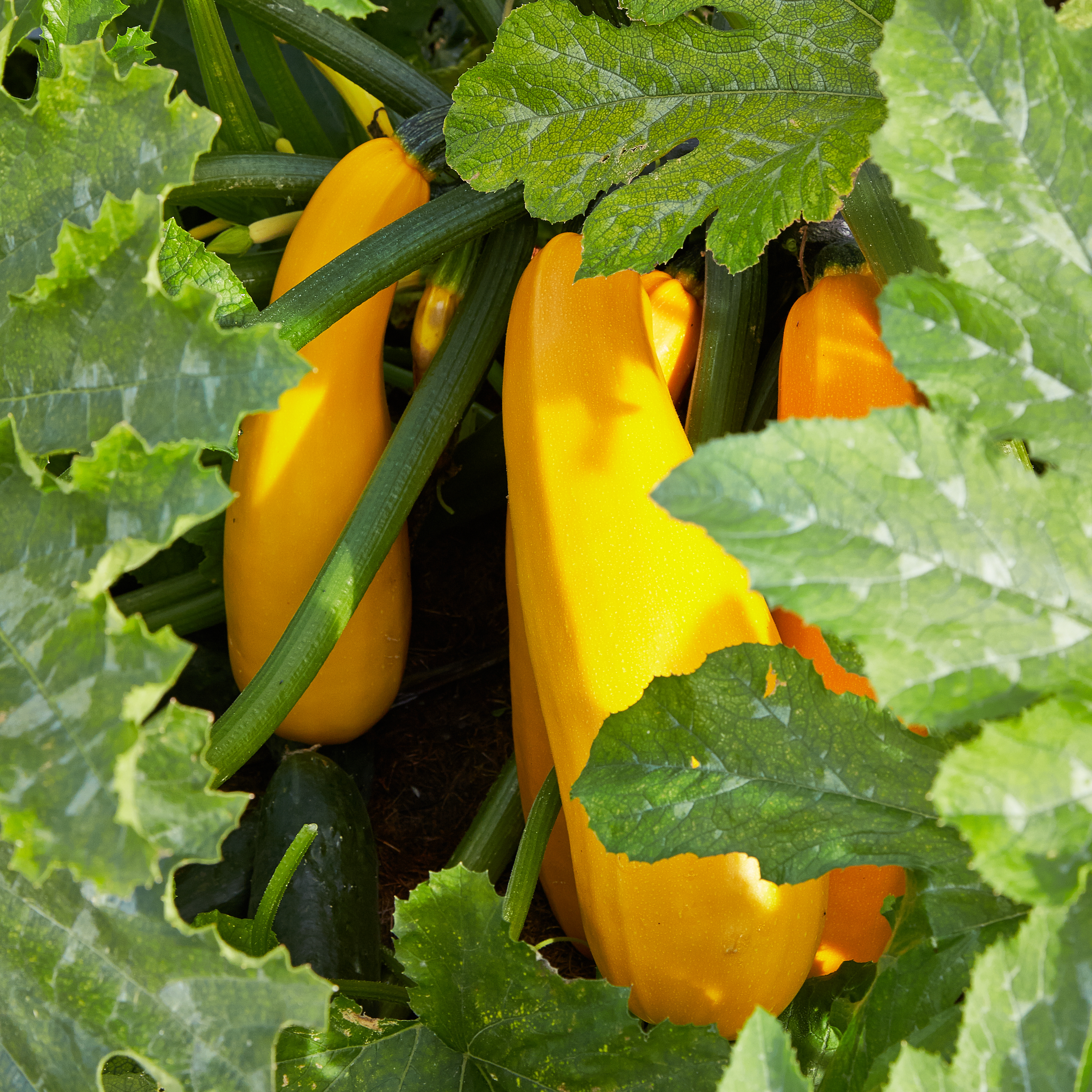 Cucurbita pepo identifierad med hjälp av skylt i Bergianska trädgården.